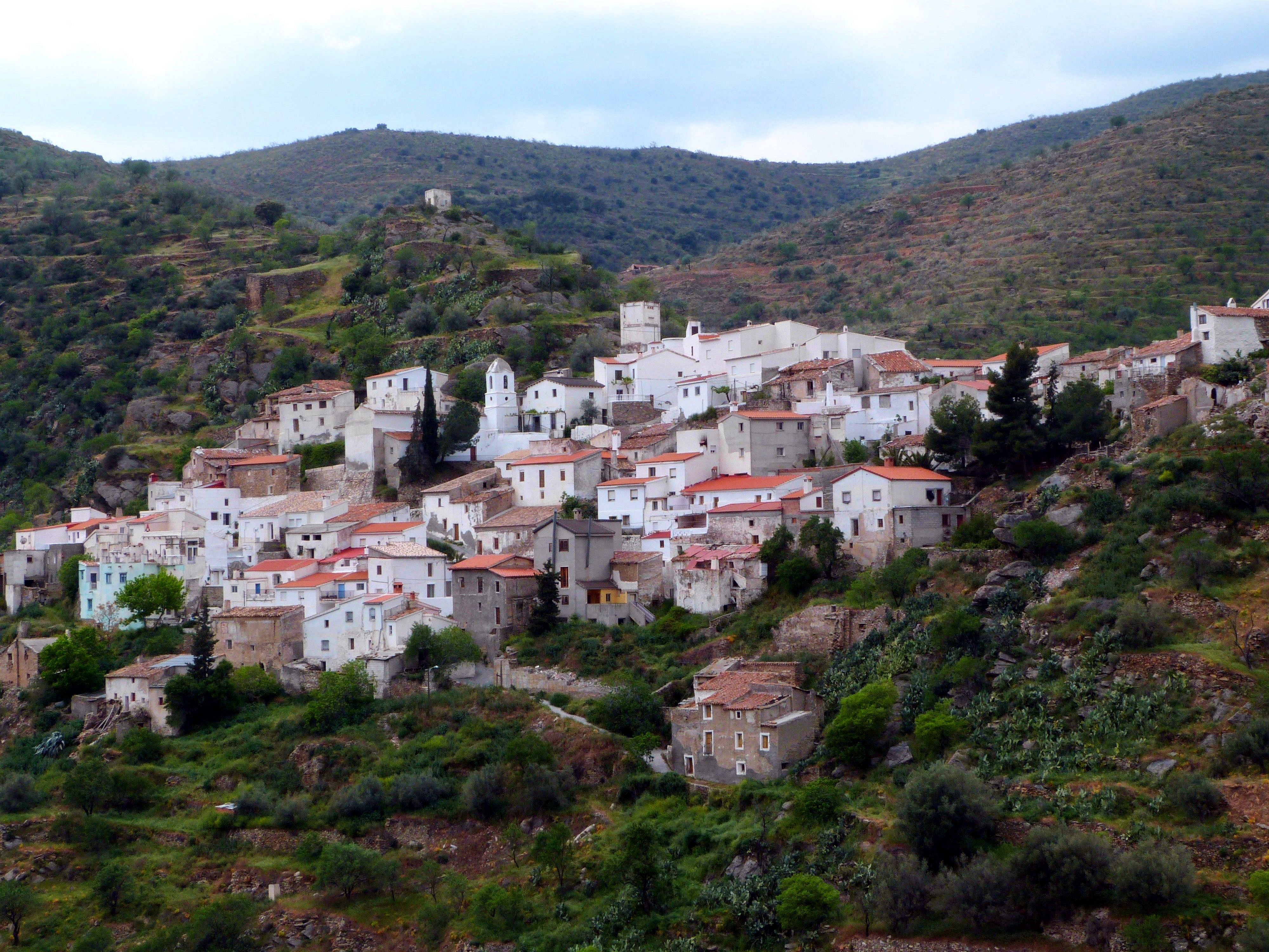 Chercos